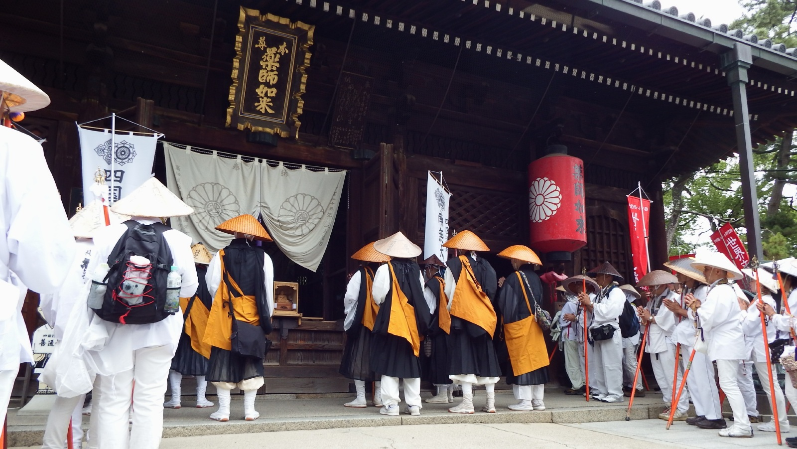 善通寺金堂の前